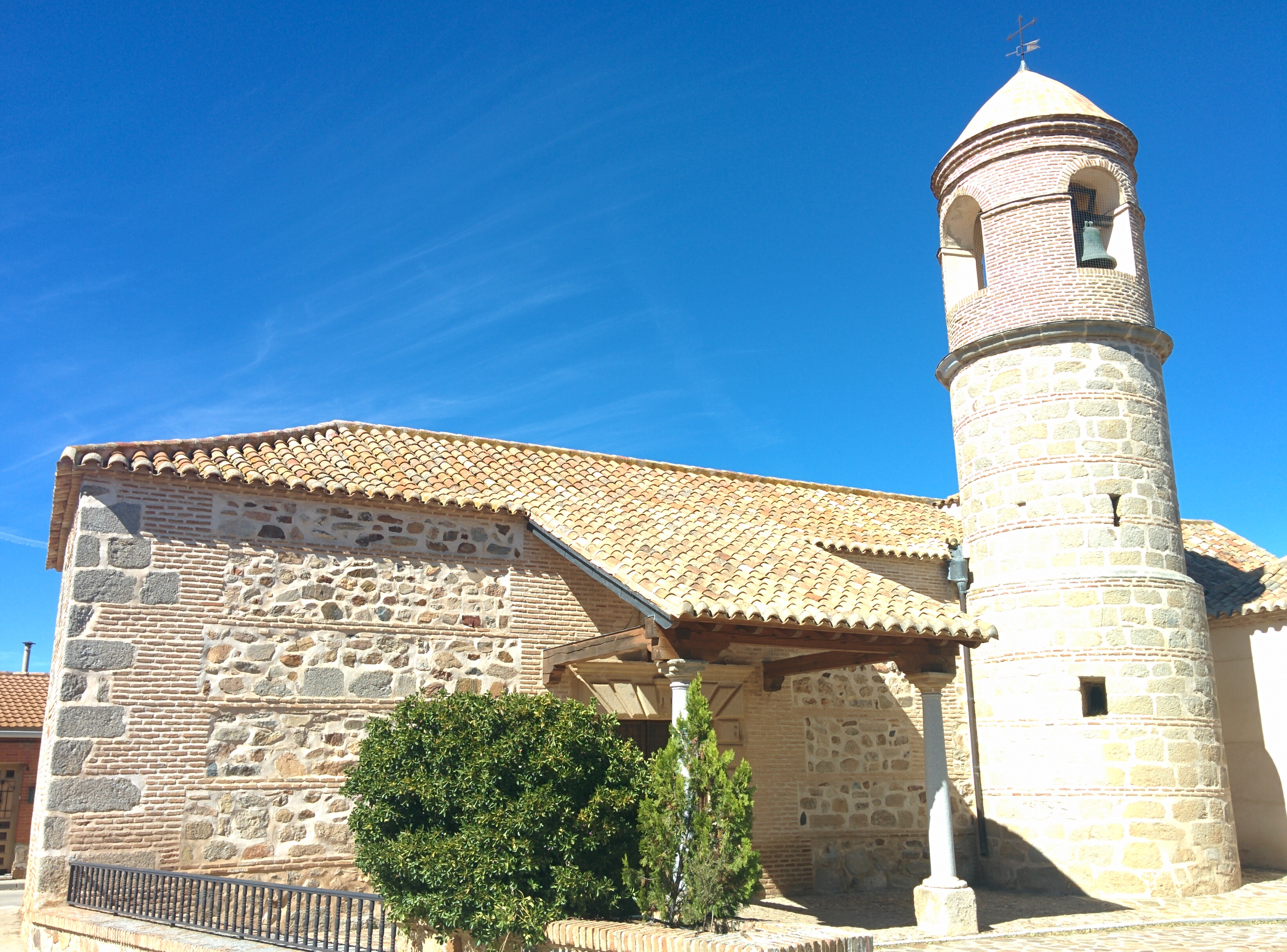 Iglesia de Nuestra Señora de la Asunción, en Arisgotas (Toledo, España).